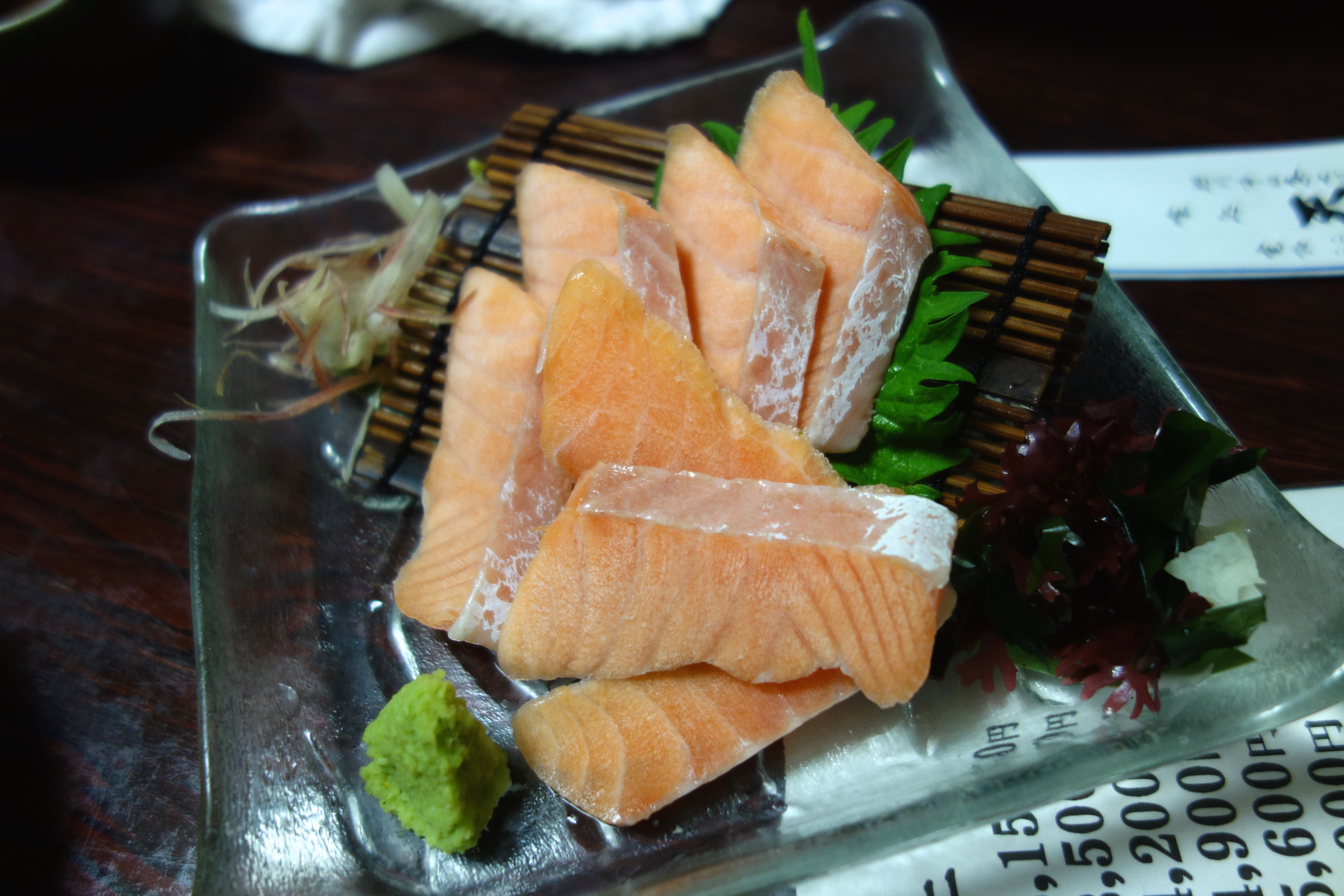 Frozen sashimi